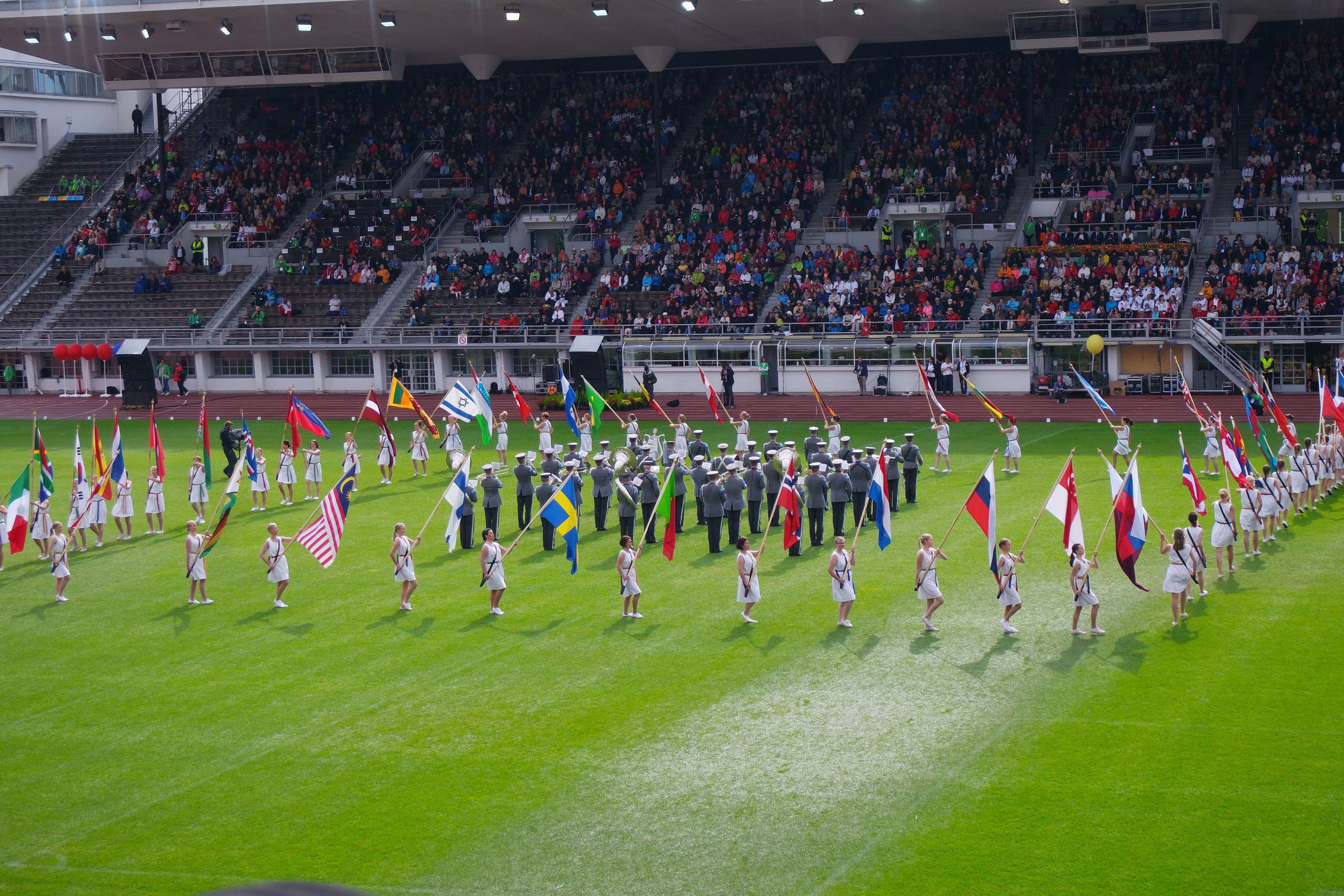 Se realiza la presentación de todos los paises que participan, con su bandera.